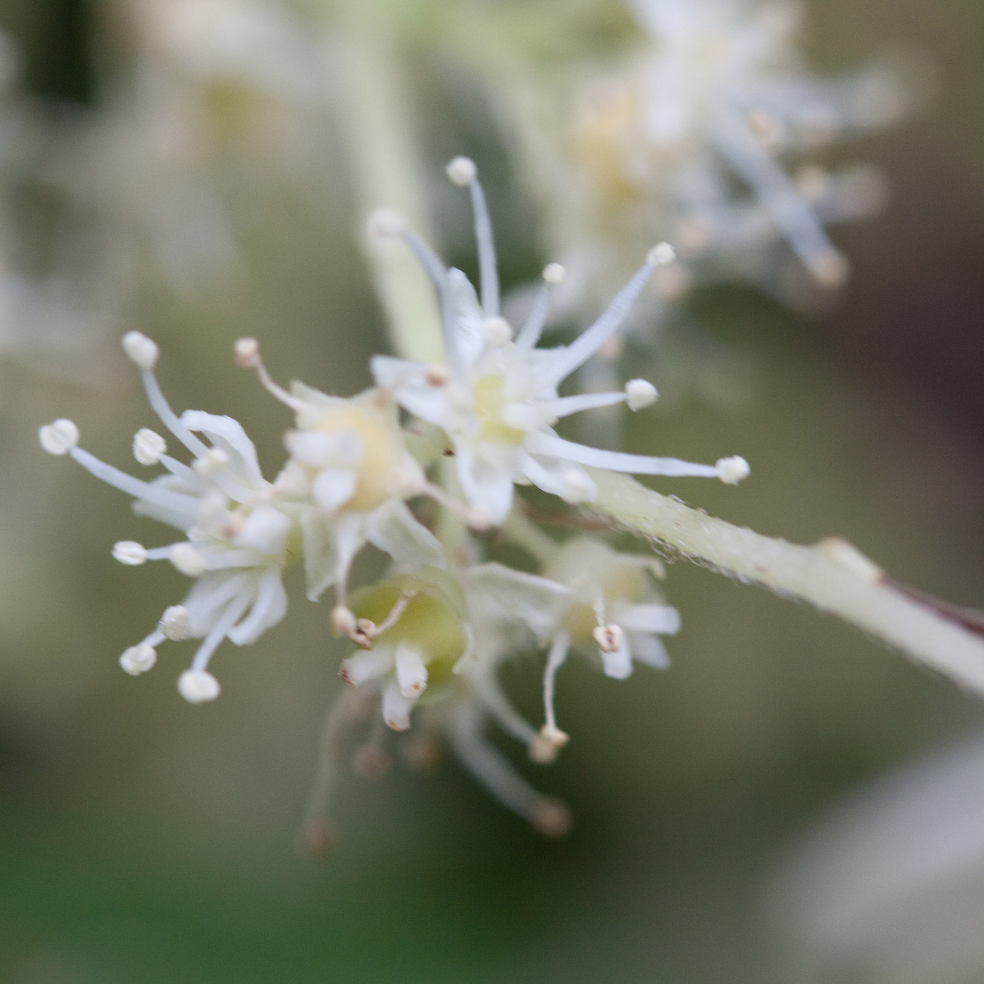 Fleurs fertiles d'Hydrangea heteromalla - Jardin botanique de Strasbourg - France